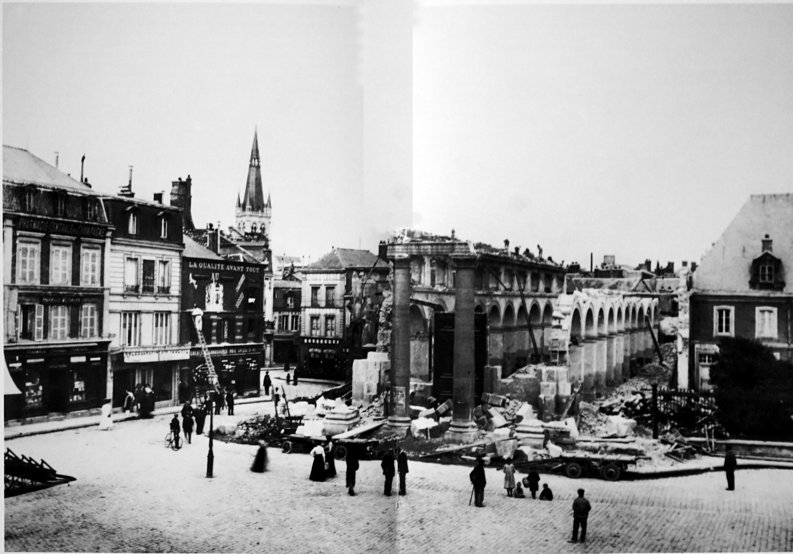 sur une vue ancienne.